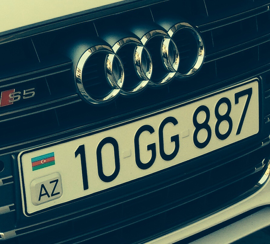 Один из номеров Азербайджана